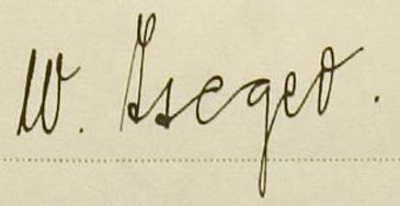 Подпись Ваута Исегера